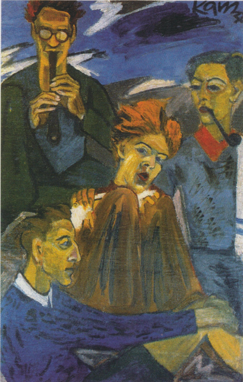 Hans-Hermann Steffens, Joachim Albrecht, Elle Nay und Klaus-Andreas Moering am Strand von Poberow 1938